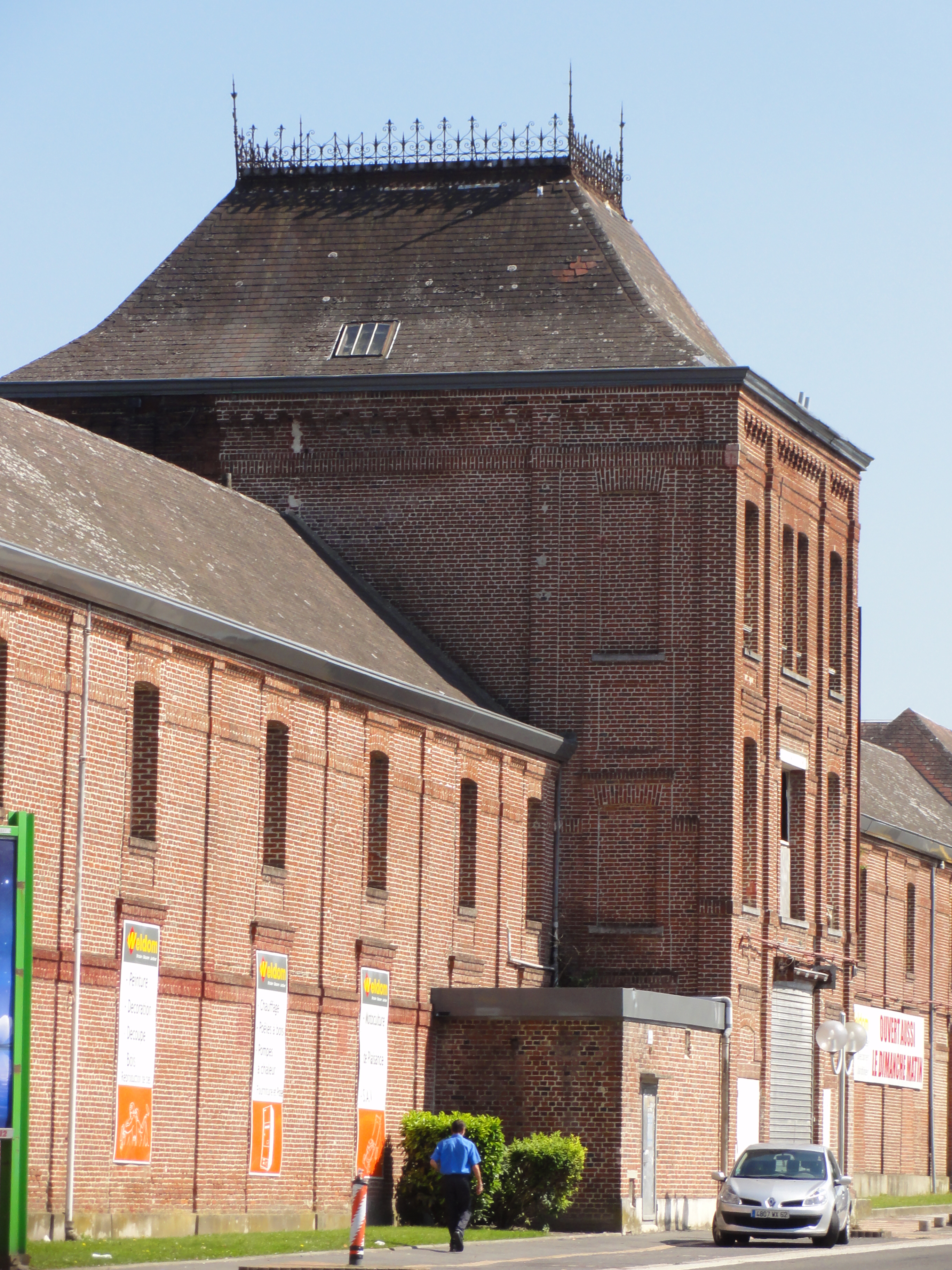 Ateliers centraux de la Compagnie des mines de Nœux dans le bassin minier du Nord-Pas-de-Calais, Nœux-les-Mines, Pas-de-Calais, Nord-Pas-de-Calais, France. .